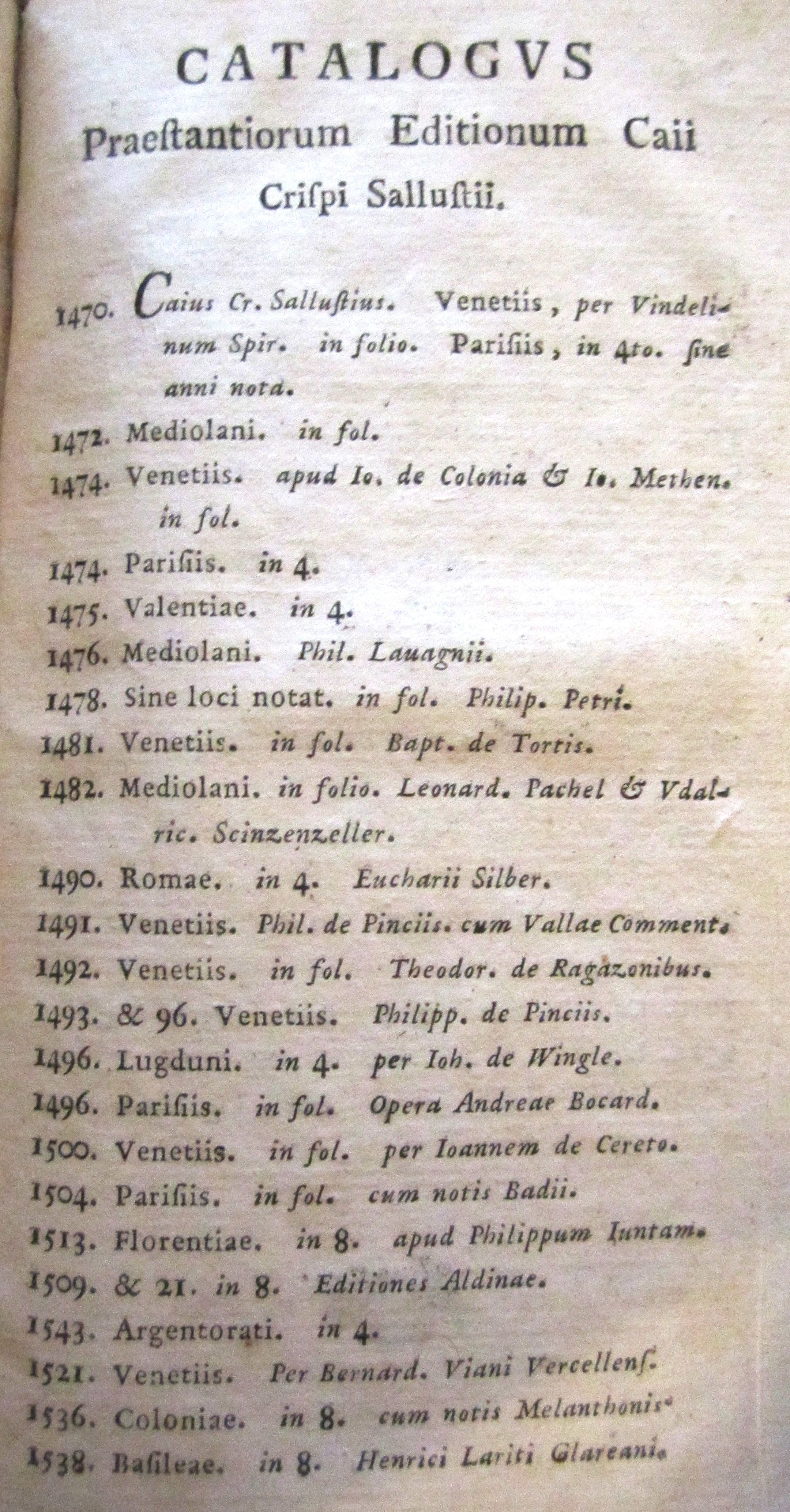 Catalogus praestantiorum editionum Caii Crispi Sallustii 1779